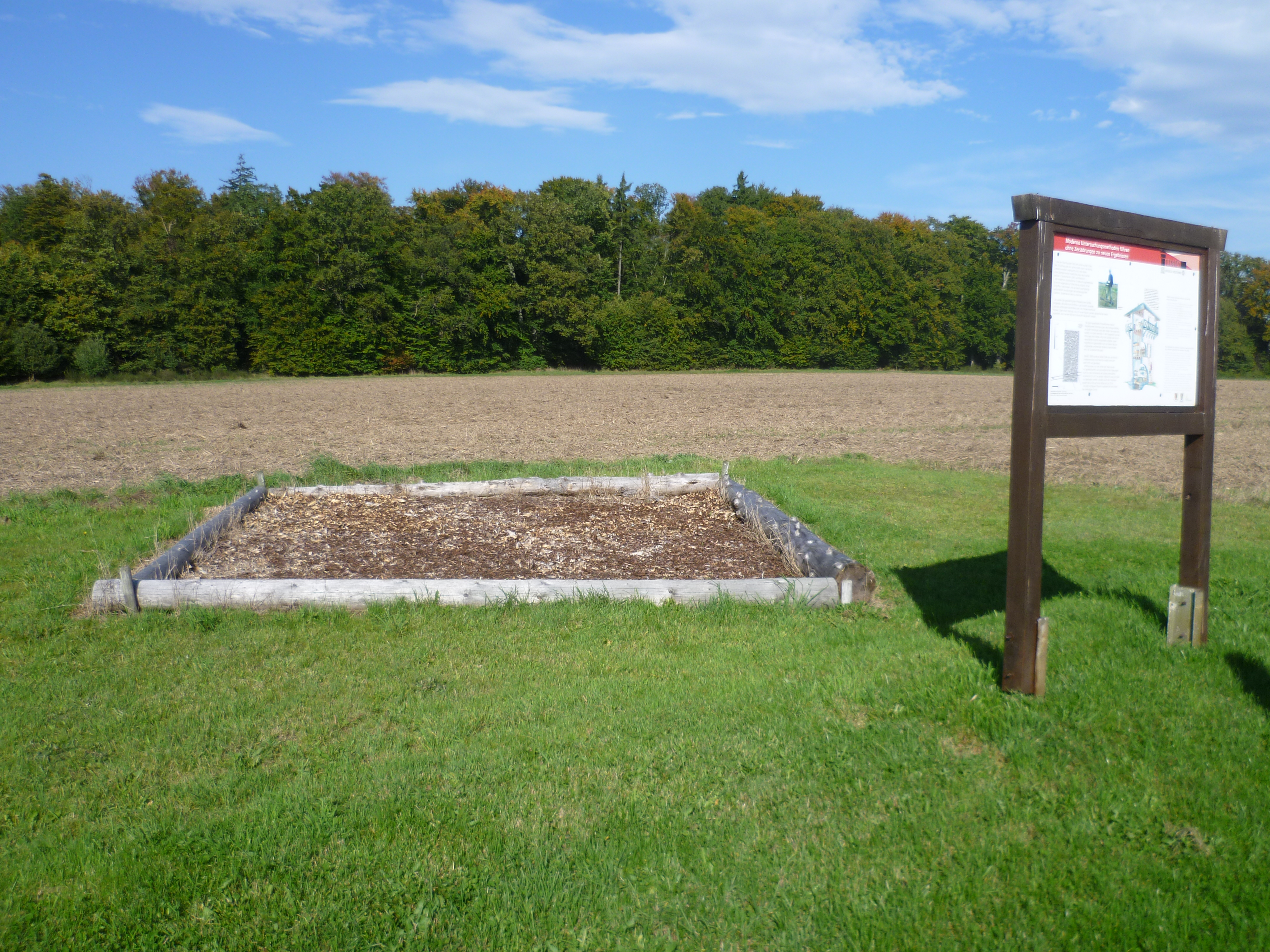 Limes-Wachturmstelle Wp 2/44 am Römerrundweg Heidenrod-Huppert